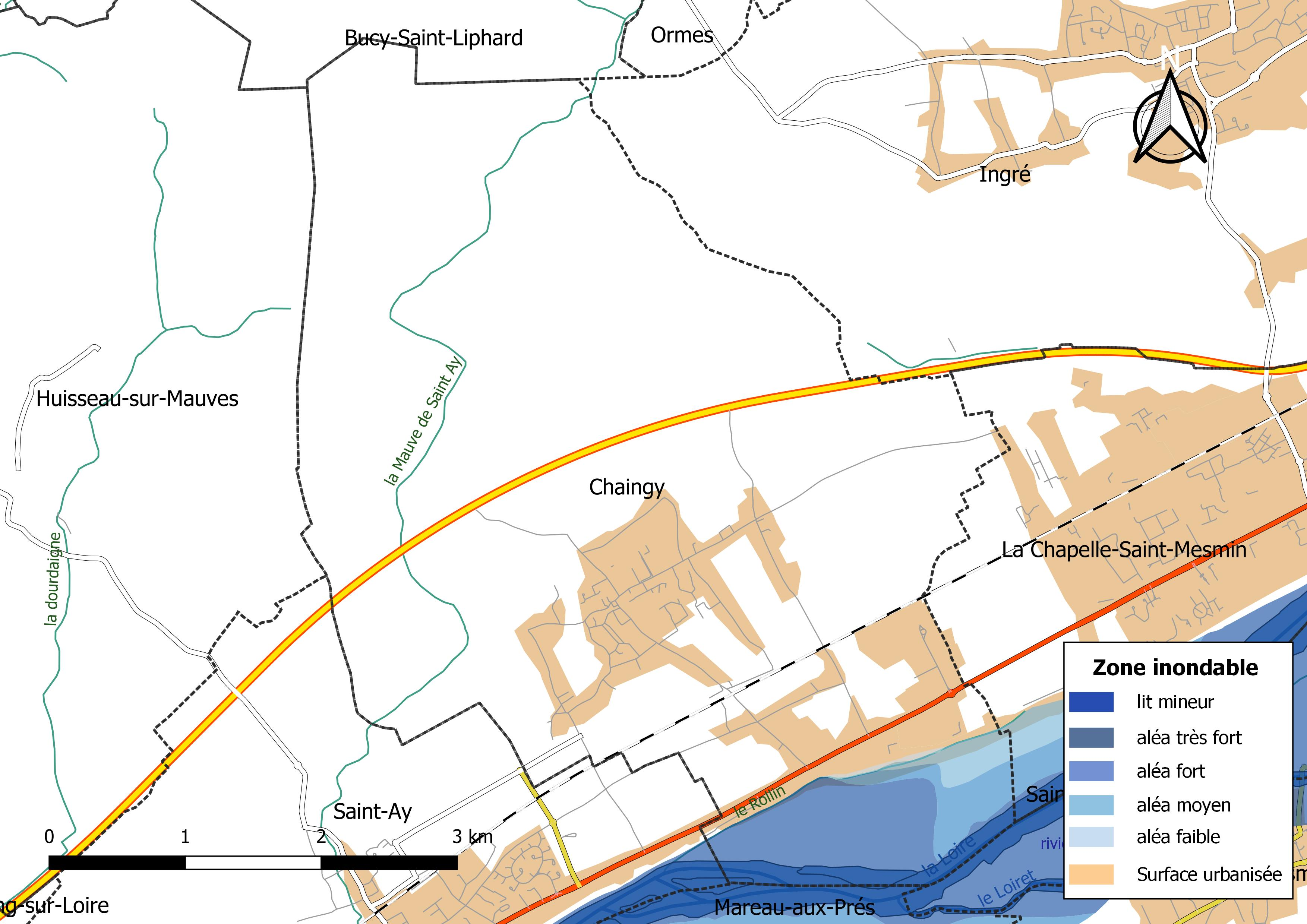 Zone inondable et réseaux hydrographique et routier de la commune de Chaingy (Loiret, France).